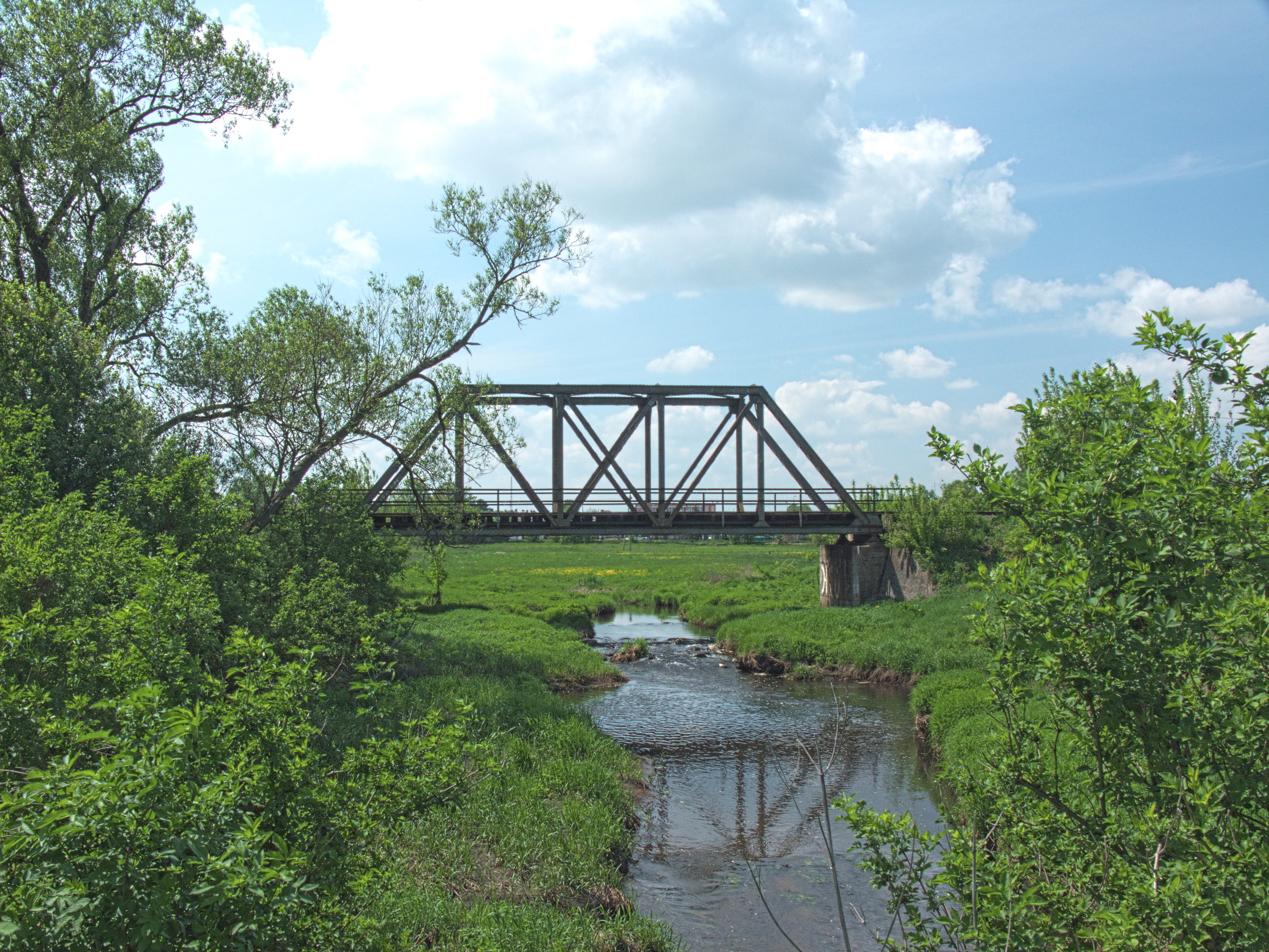 Most kolejowy na linii kolejowej nr 32 przerzucony nad Białą w Bielsku Podlaskim. Widok w kierunku zachodnim.